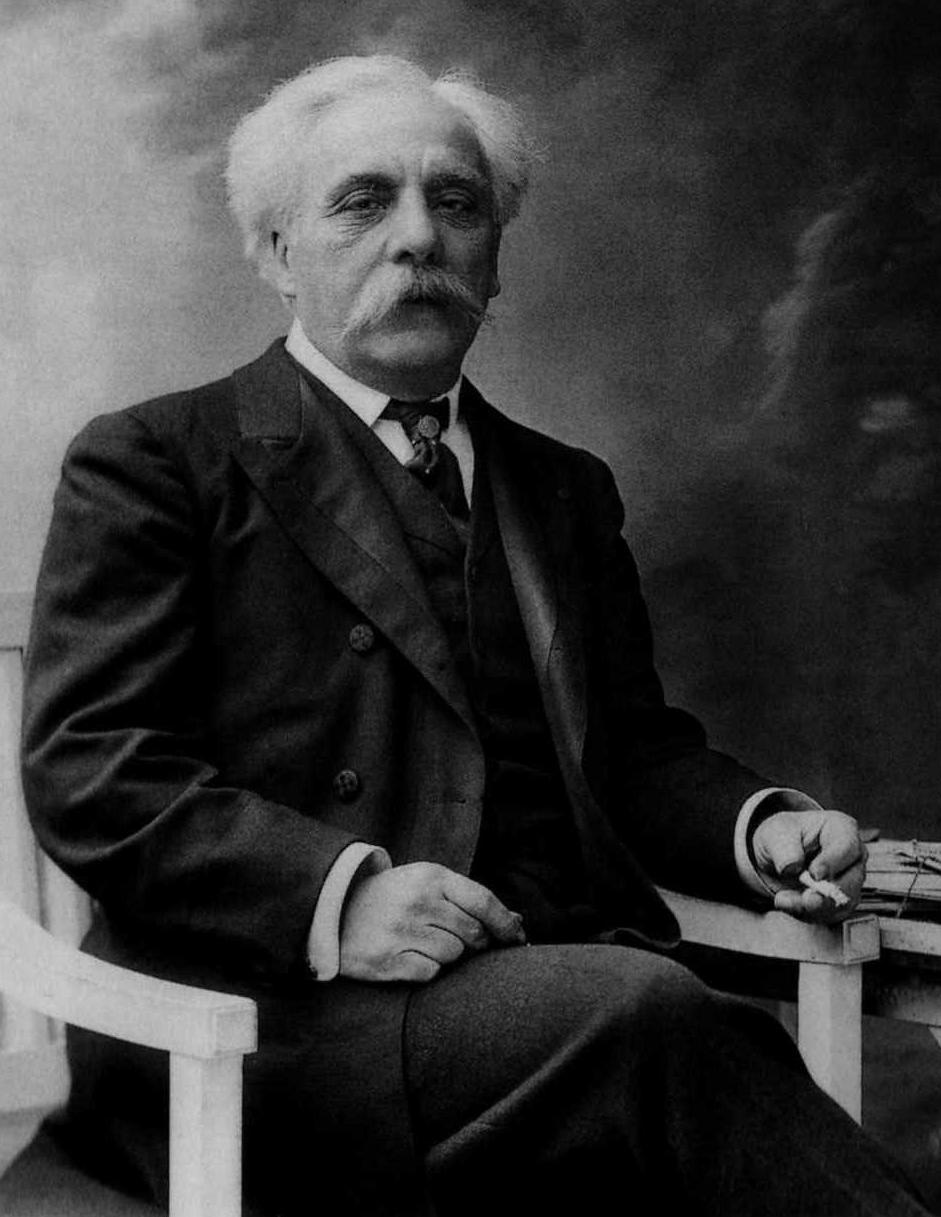 Gabriel Fauré par Paul Nadar en 1905